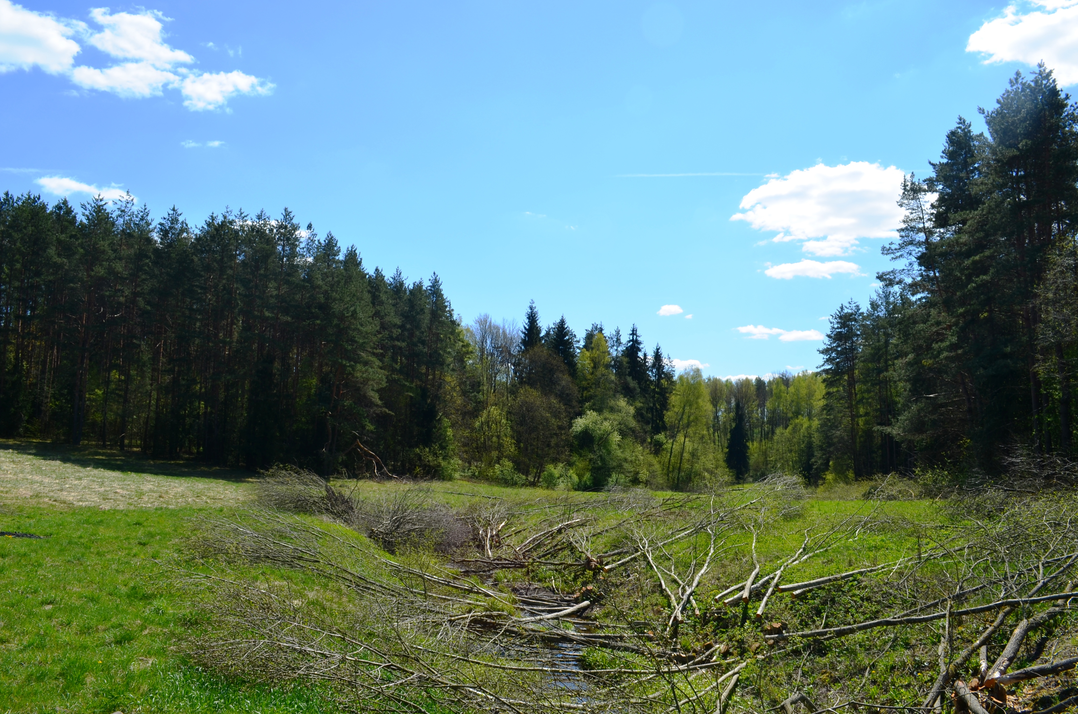 Raudondvario miškas ir bevardis(?) upelis šalia Avietynės, Riešės sen., Vilniaus raj.